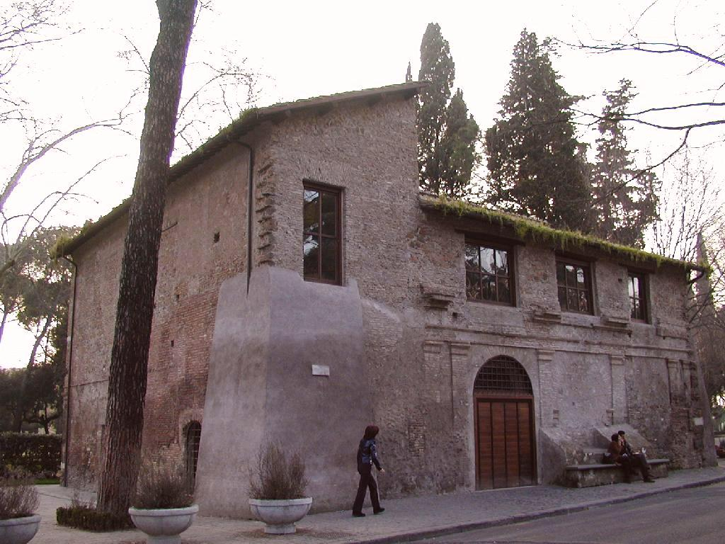 Roma, santa Maria in Tempulo alla Valle delle Camene, ora sito per celebrazione di matrimoni civili del comune di Roma